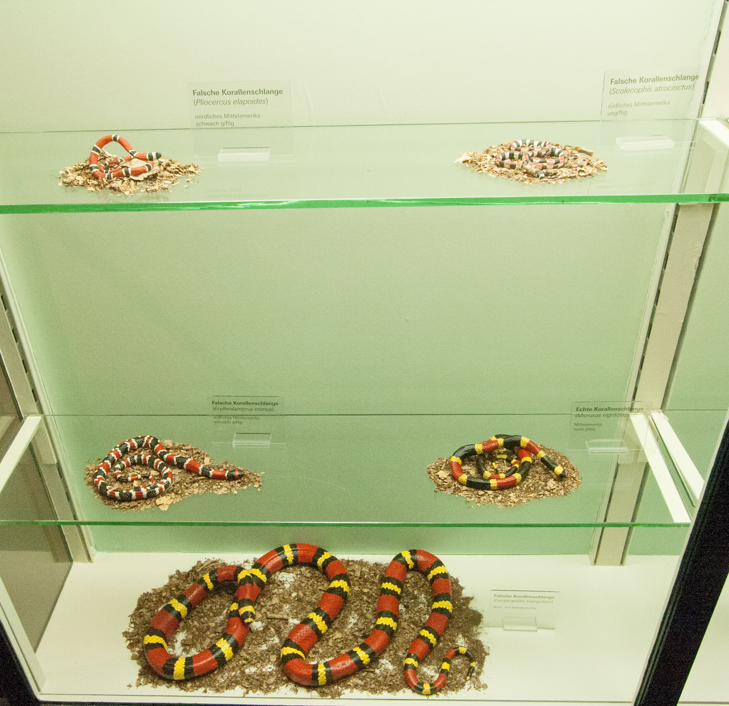 label QS:Lde,"Echte und falsche korallschlangen"label QS:Lhu,"Igazi (középen jobbra) és hamis (mimikri) korallkígyók"